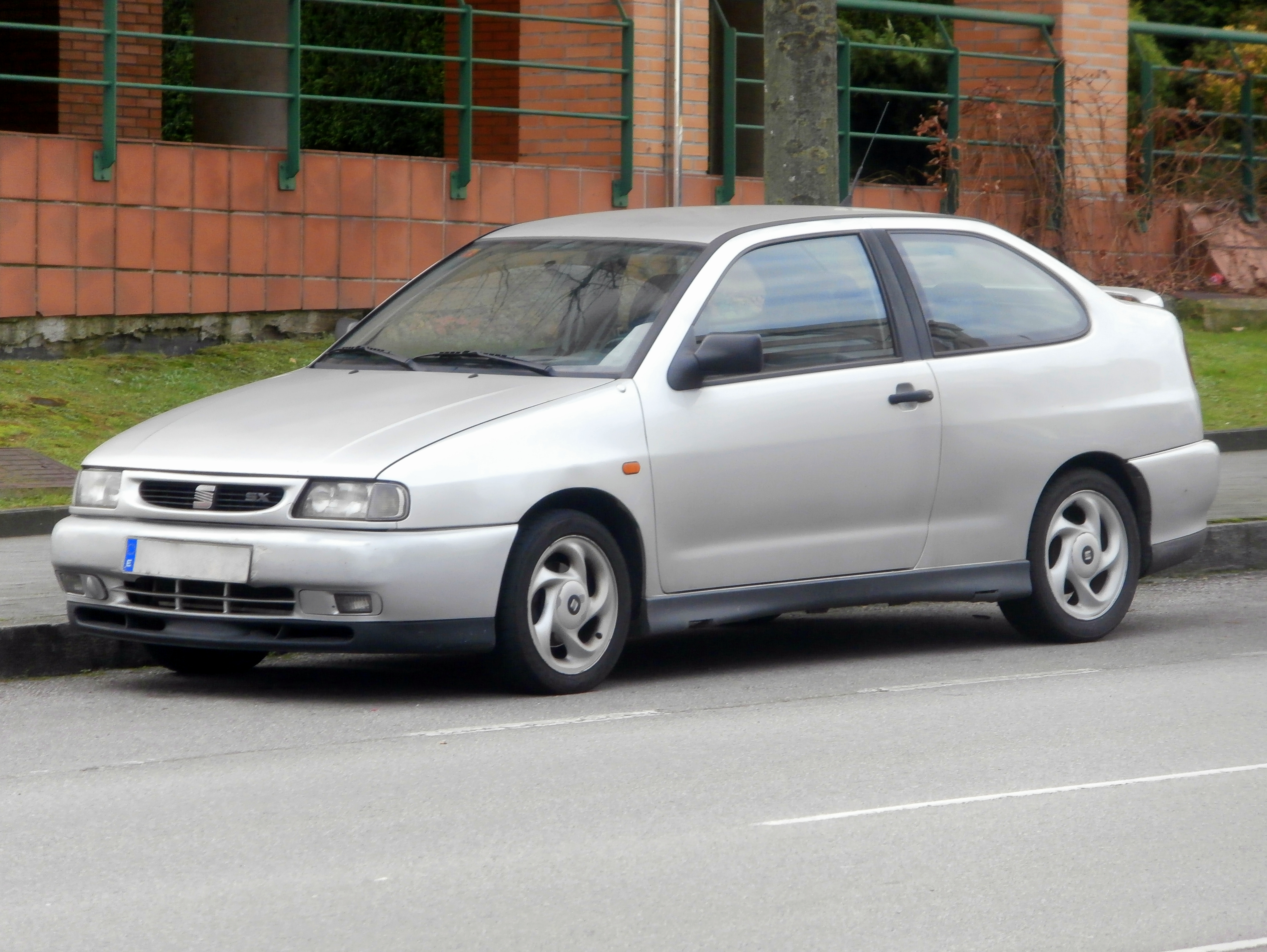 SEAT Córdoba SX Plata 1995